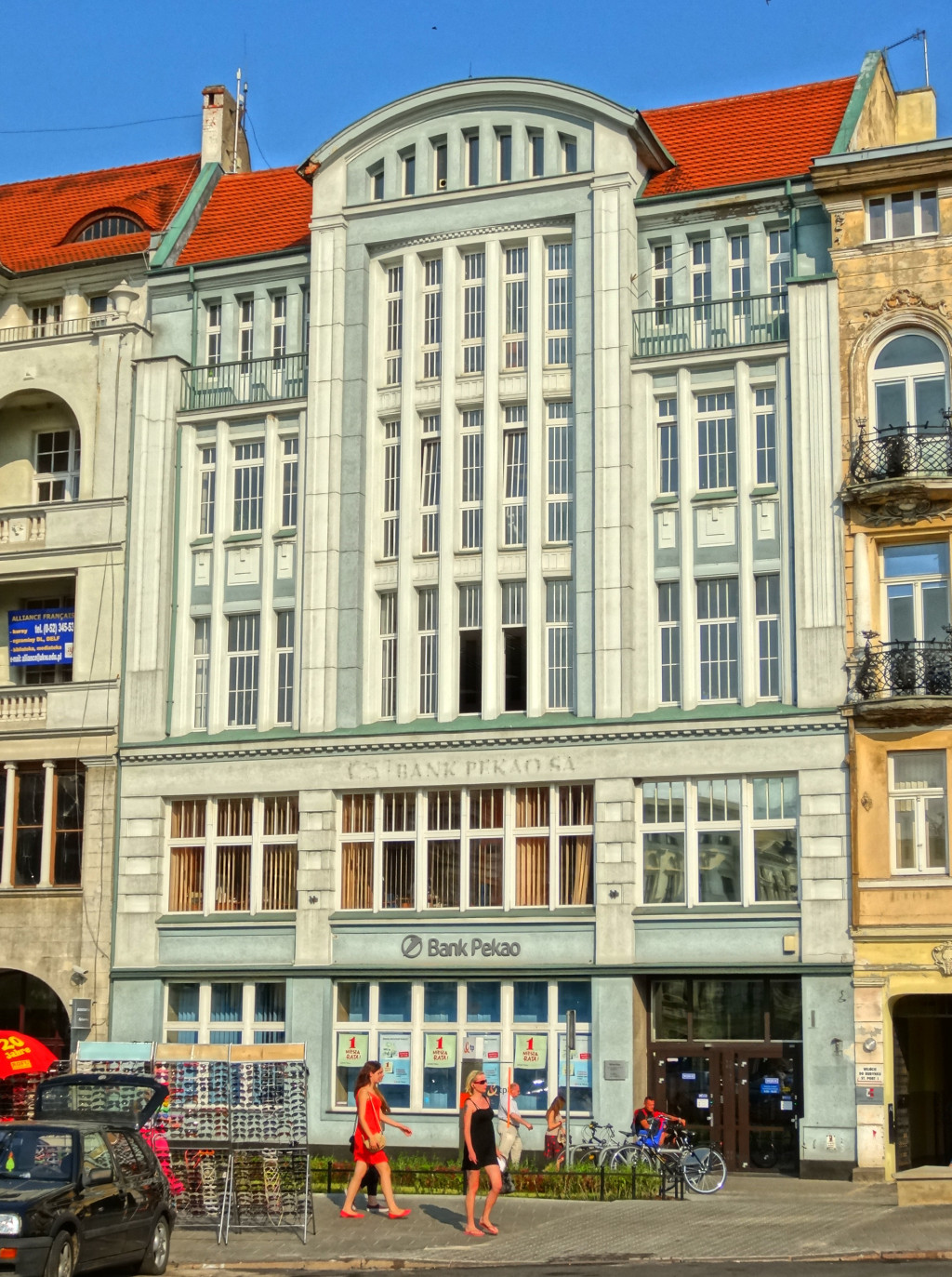 Plac Teatralny w Bydgoszczy